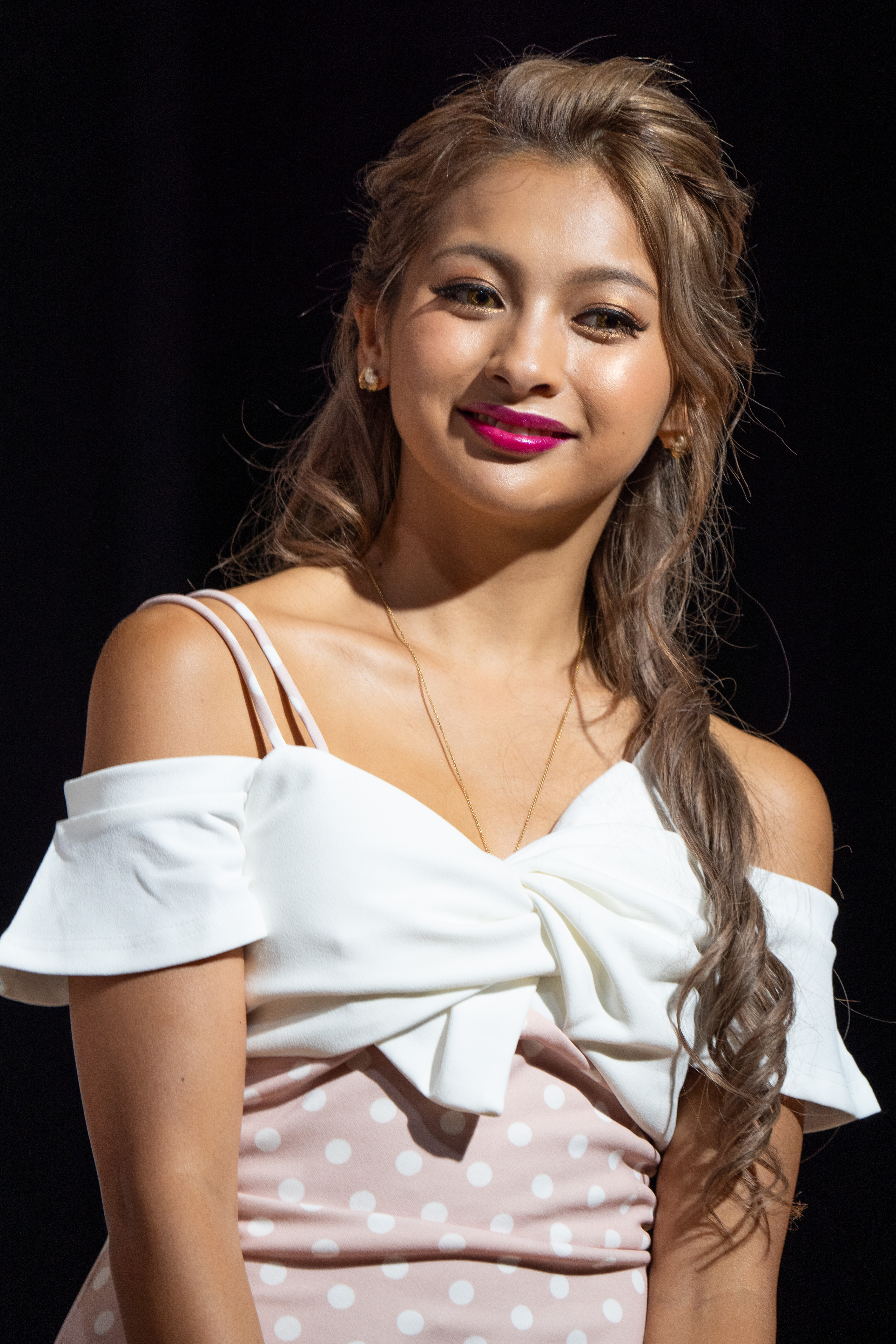 Super! C CHANNEL 2019 木村有希